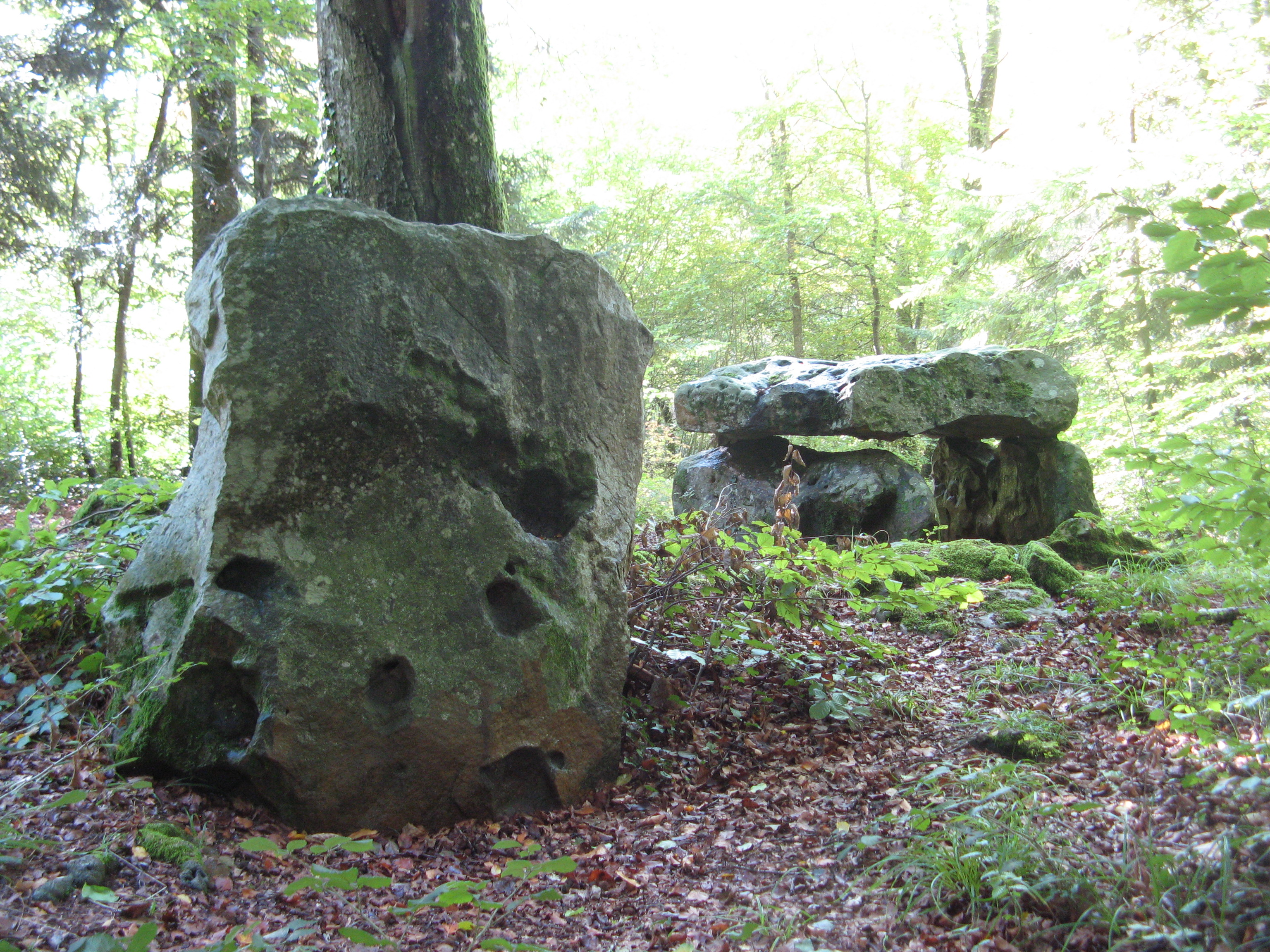 Saint-Maurice-aux-Riches-Hommes : menhir et dolmen de Lancy .